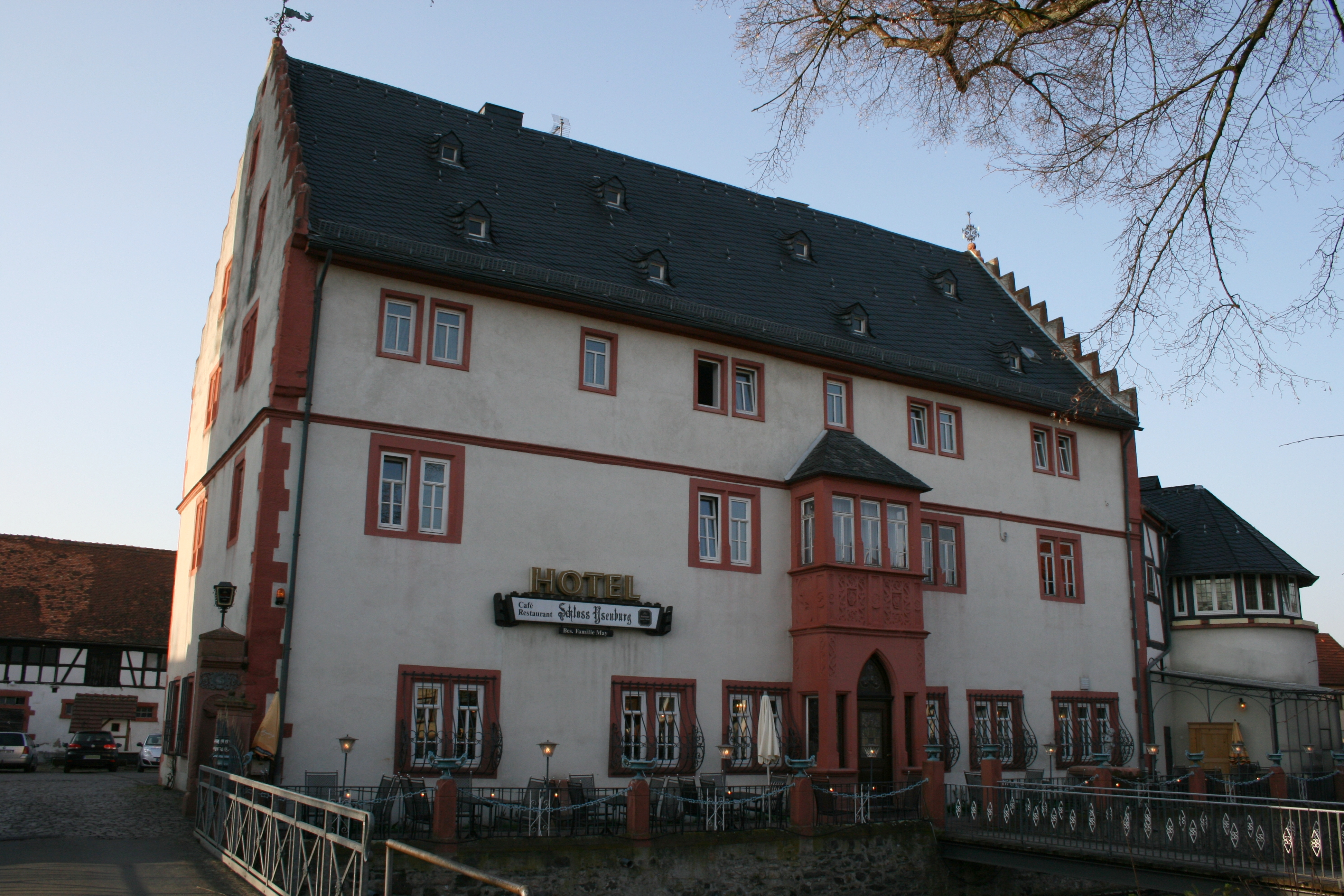 Schloss Ysenburg, Renaissancegebäude als Teil der Burg Staden in Florstadt-Staden, Hessen.